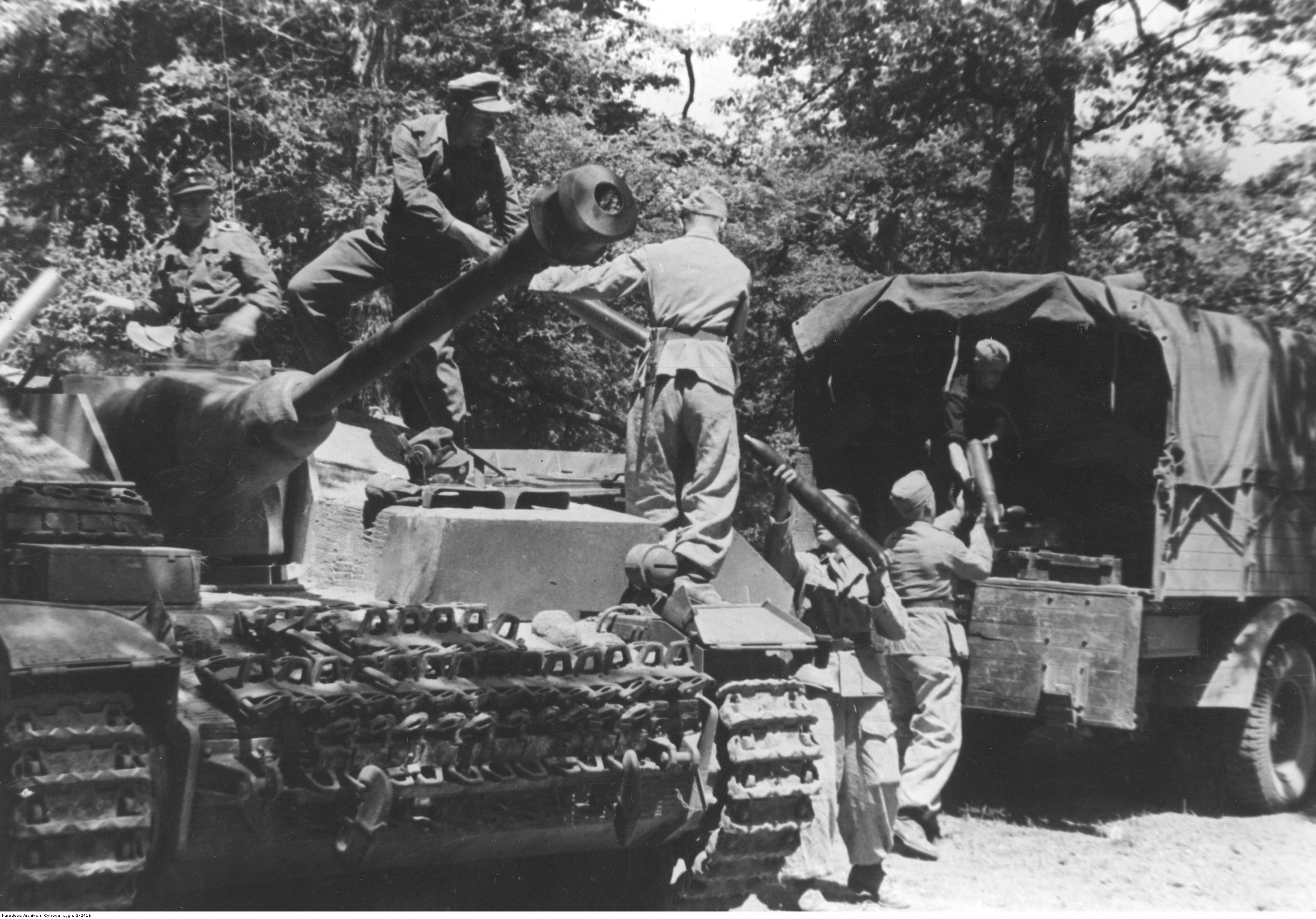 Działo samobieżne StuG IV podczas zaopatrywania w amunicję przez jednostki transportowe NSKK (Narodowosocjalistyczny Korpus Samochodowy).